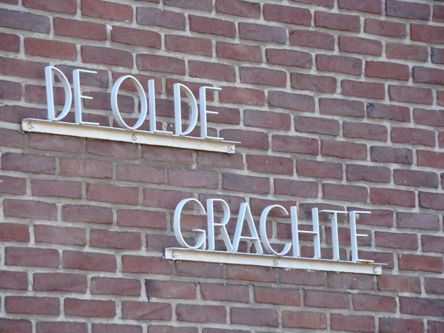 Straat in Bredevoort Tramstraat. De Olde Grachte